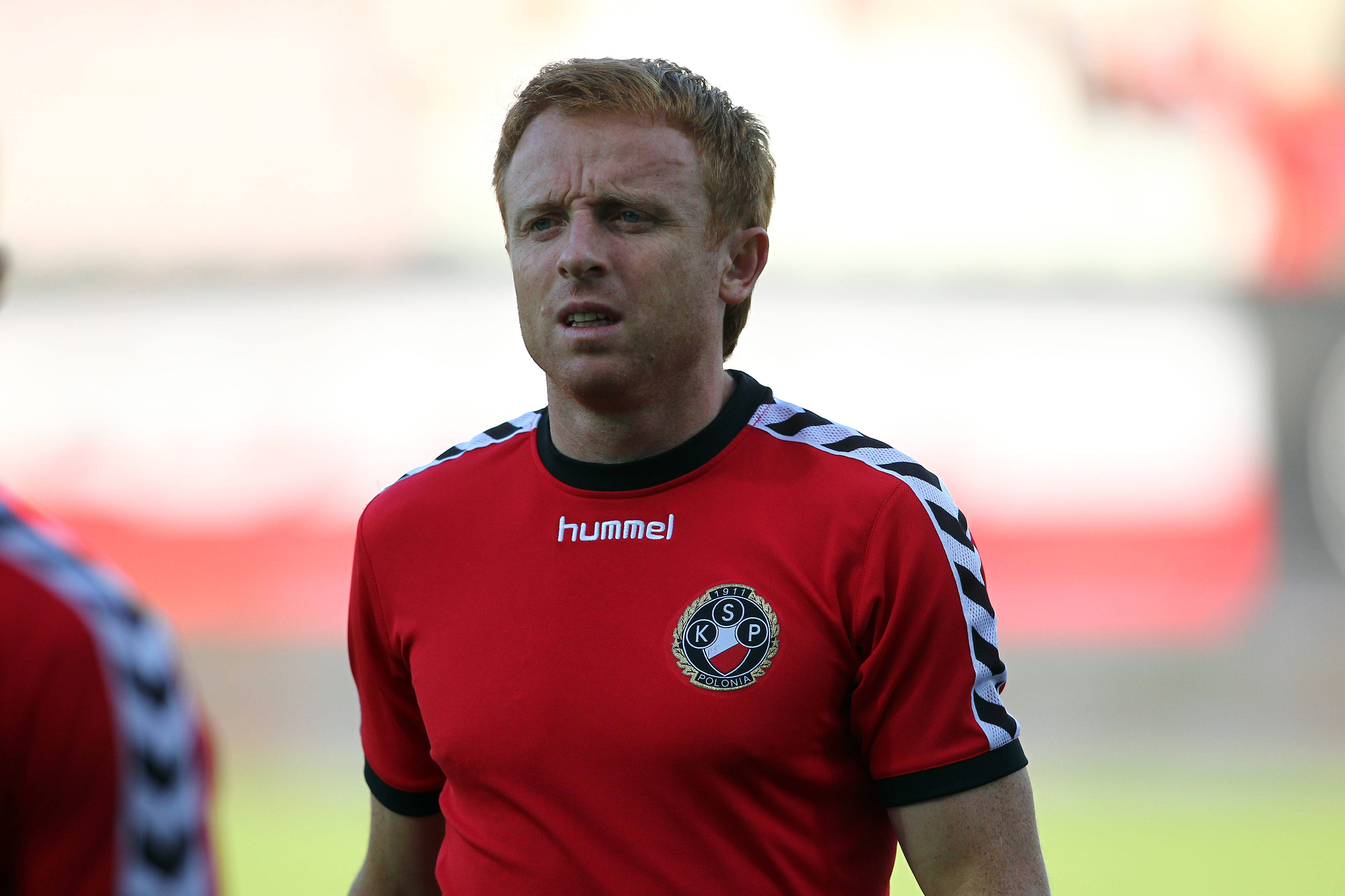 coach Piotr Stokowiec (2010)